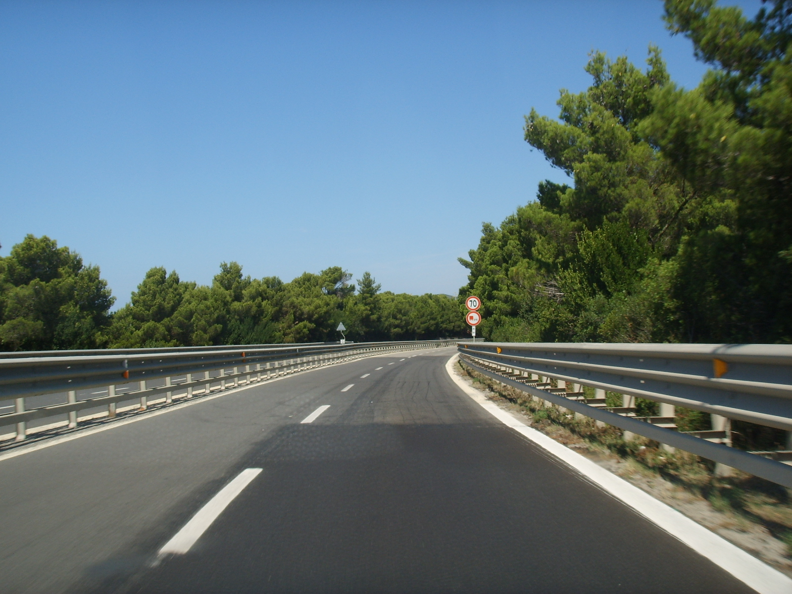 Via aurelia presso livorno